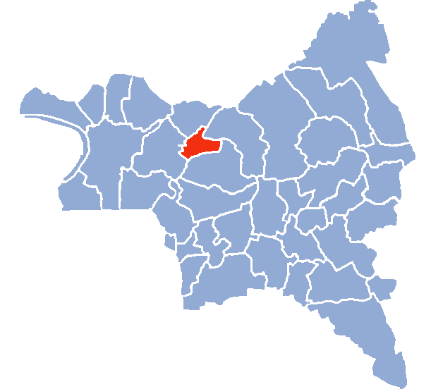 Auteur Hervé SUAUDEAU Licensing Catégorie:Cartes de Seine-saint-Denis Catégorie:Le Bourget (Seine-Saint-Denis)